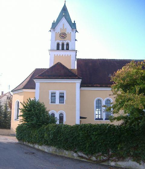 Oberfinningen